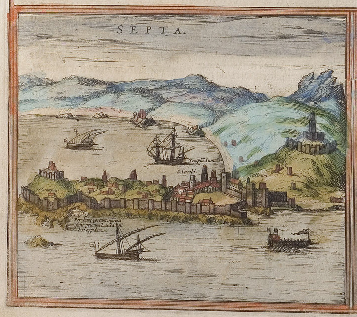 Ceuta